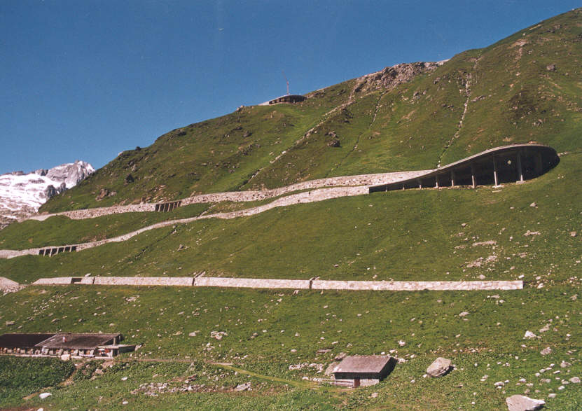 Furkapasweg aan de Walliserzijde. Foto 2001, Angélique Leunissen